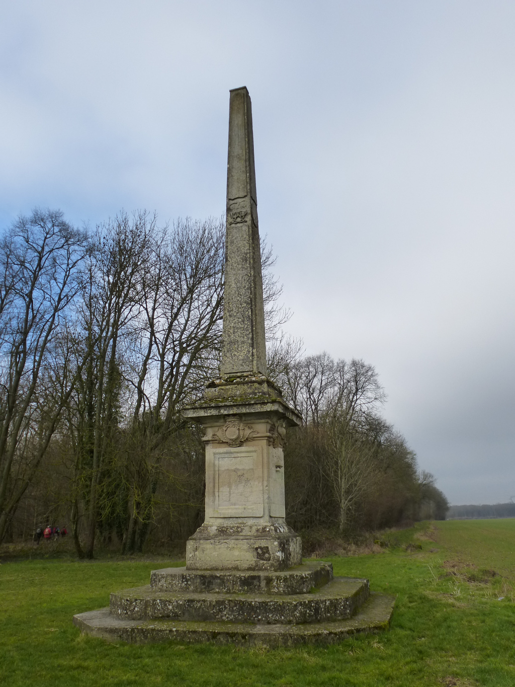 Obélisque de Saint-Vrain. (département de l'Essonne, région Île-de-France).